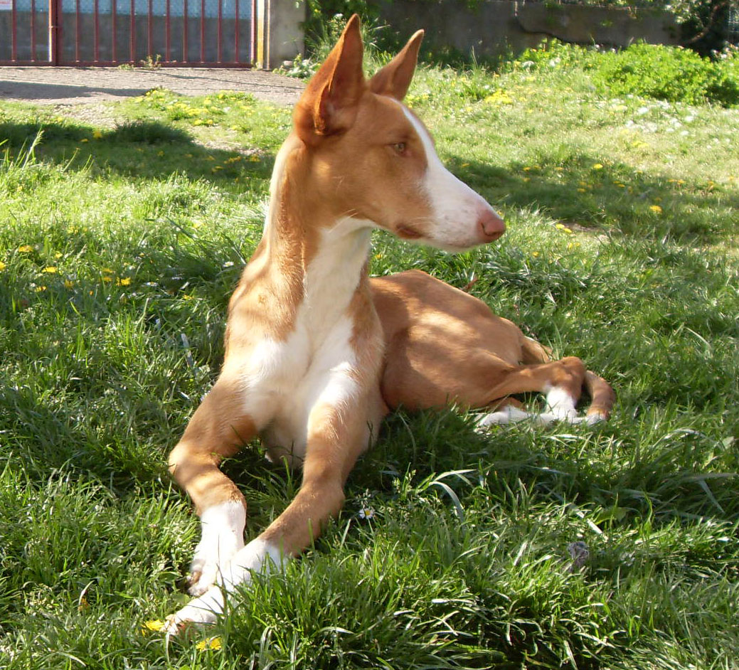 Femelle Podenco Ibicenco poil court